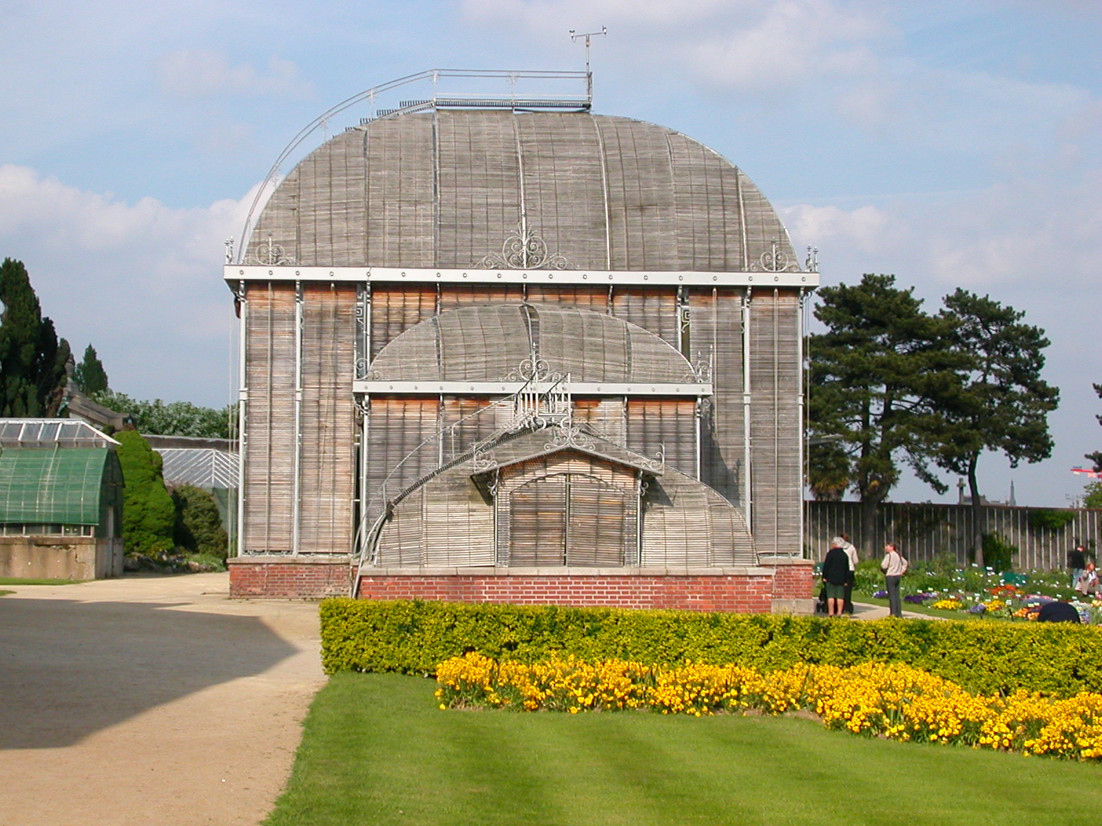 Palmarium du Jardin des plantes de Nantes. Stores tirés pour protéger les plantes du soleil.